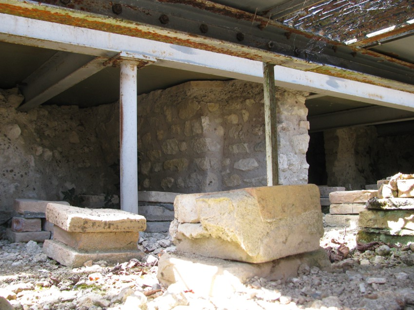 Villa gallo-romaine de Montcaret (Dordogne). Vestiges de l'hypocauste et plancher de soutien des mosaiques de la grande salle à abside